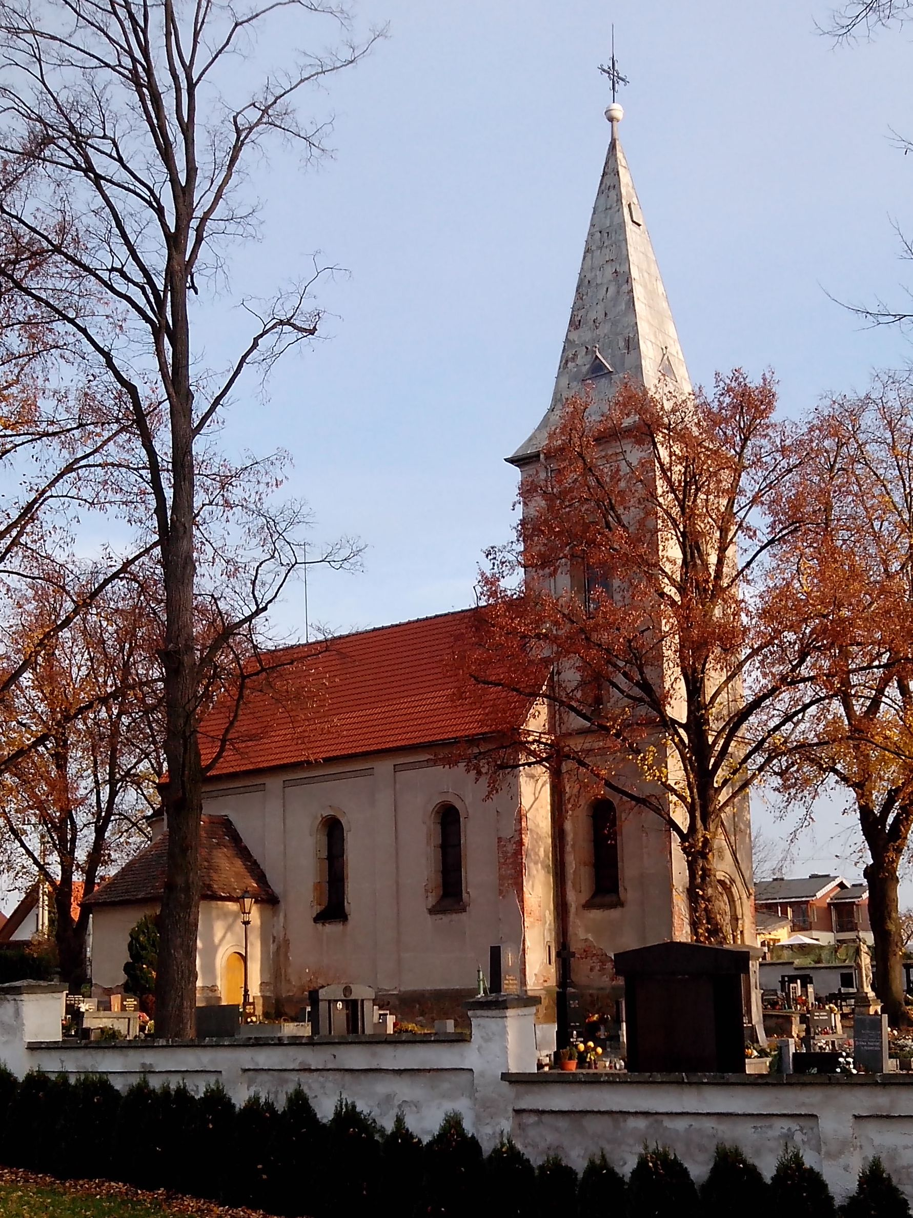 Kaple Božského Srdce Páně (Solnice)